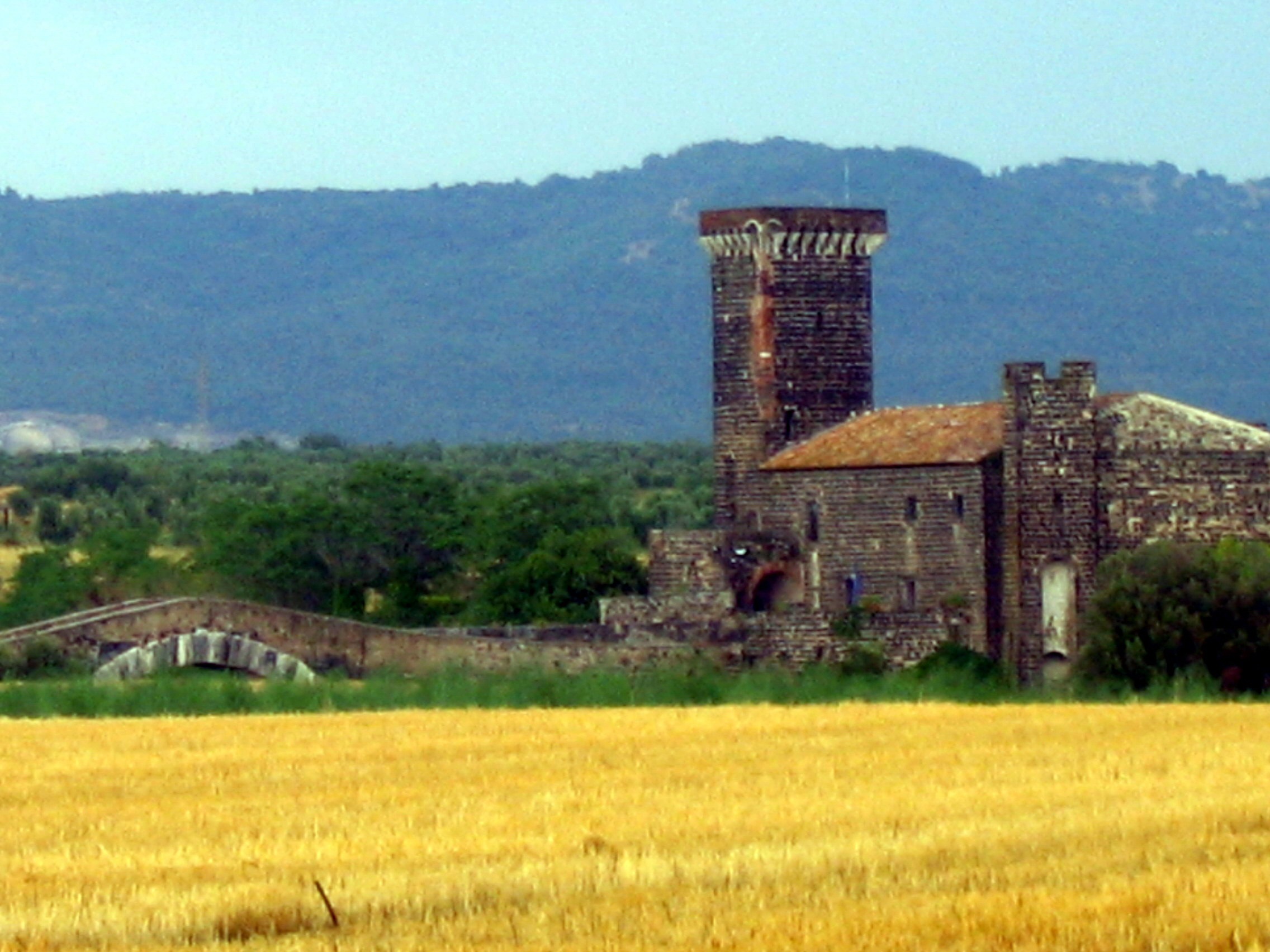 Vulci, Toscana, Italy